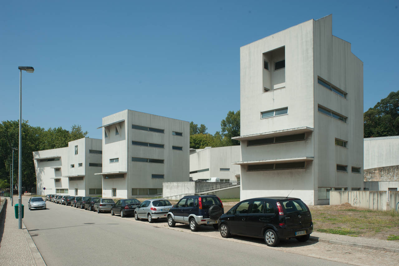 Escuela de Arquitectura de Oporto Alvaro Siza Vieira 1987-1994 Porto Portugal 2011-08-19